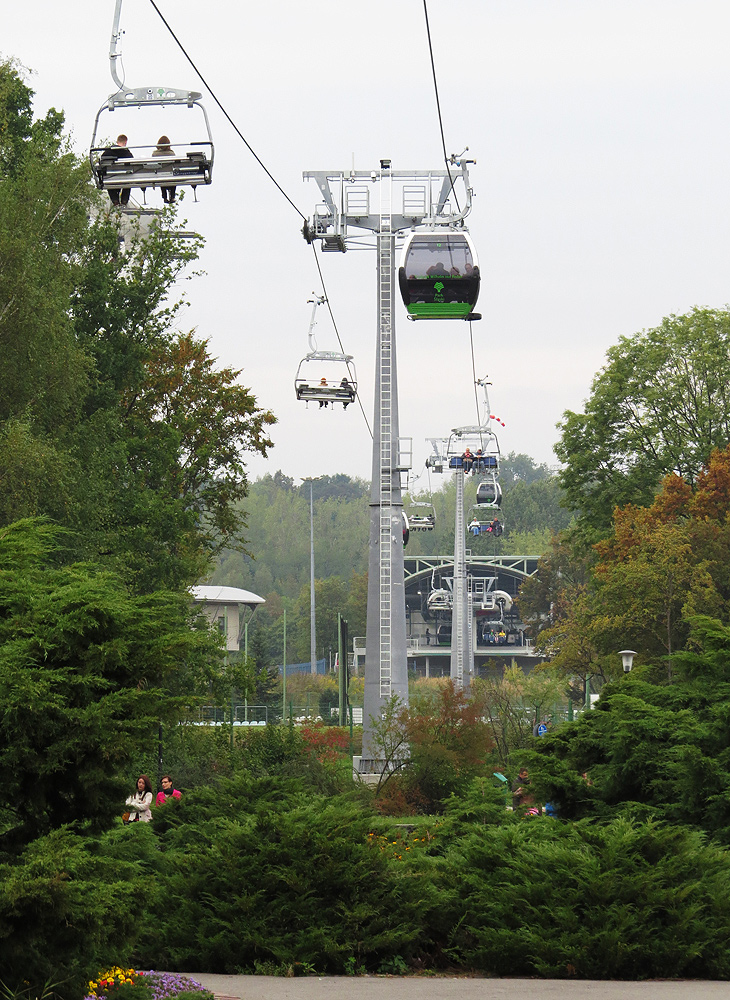 Kolejka linowa Elka w Parku Śląskim w Chorzowie 2013